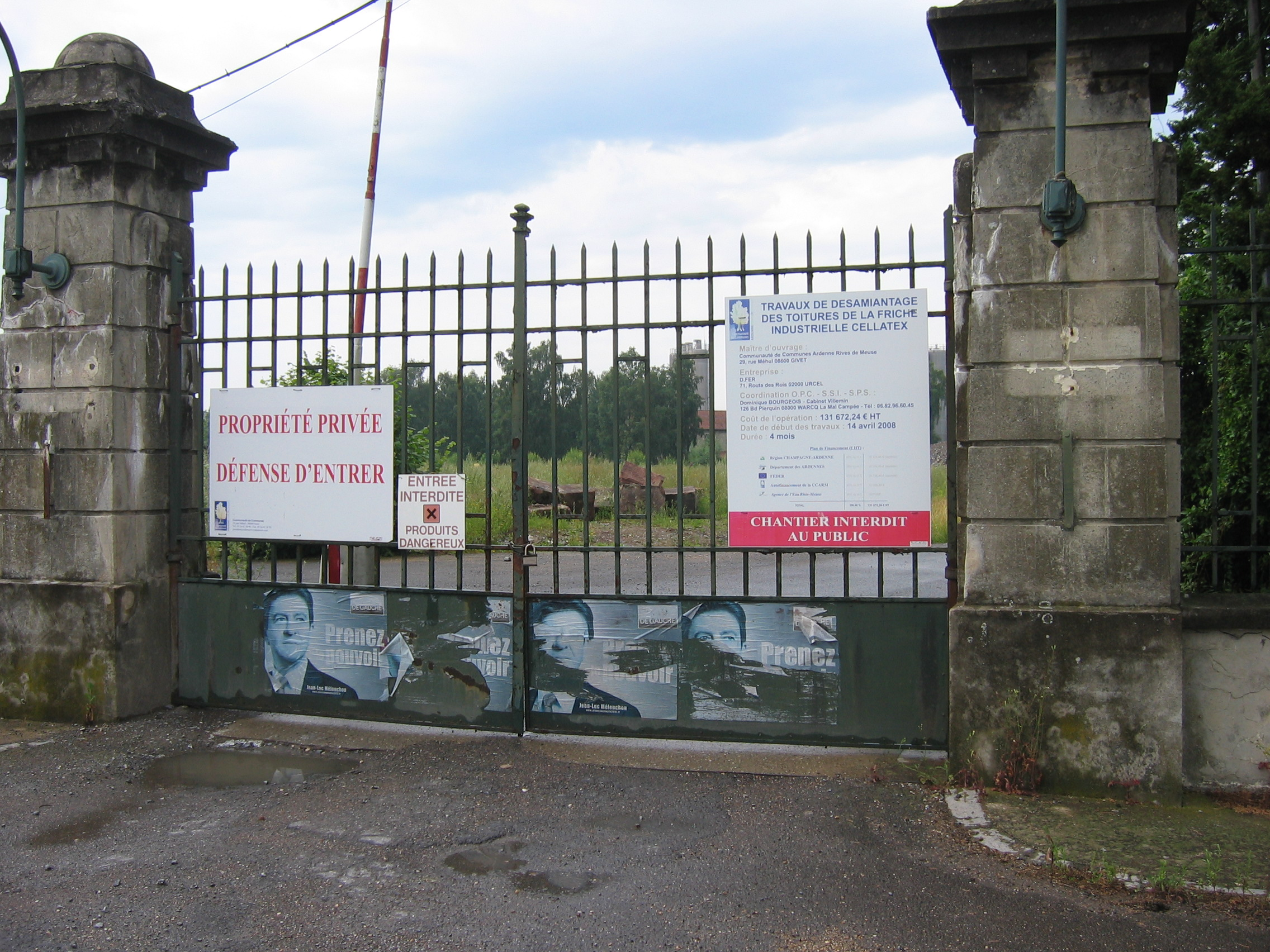 Site de Cellatex en 2012 à Givet, en Ardennes (France) 05